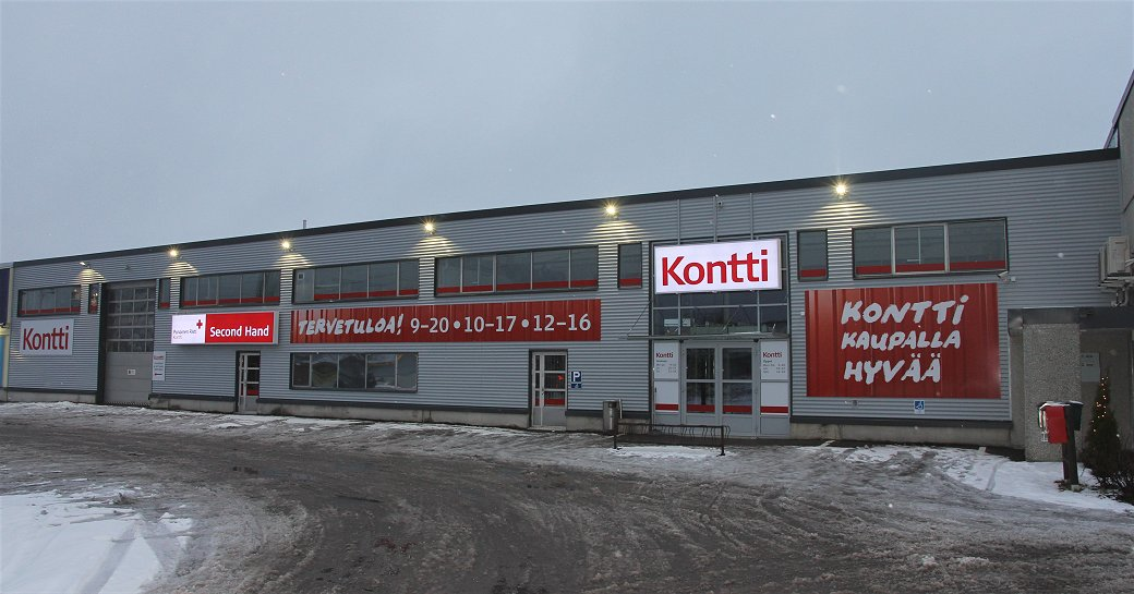 Suomen Punaisen Ristin Kontti-kierrätystavaratalo Vantaan Tammistossa. Kontissa myydään lahjoituksena saatuja tuotteita SPR:n toiminnan tukemiseksi. Kontin tuloksesta 50% menee SPR:n paikallisen piirin ohjelmatyöhön, 25% katastrofirahastoon ja 25% Kontti-ketjun kehittämiseen.